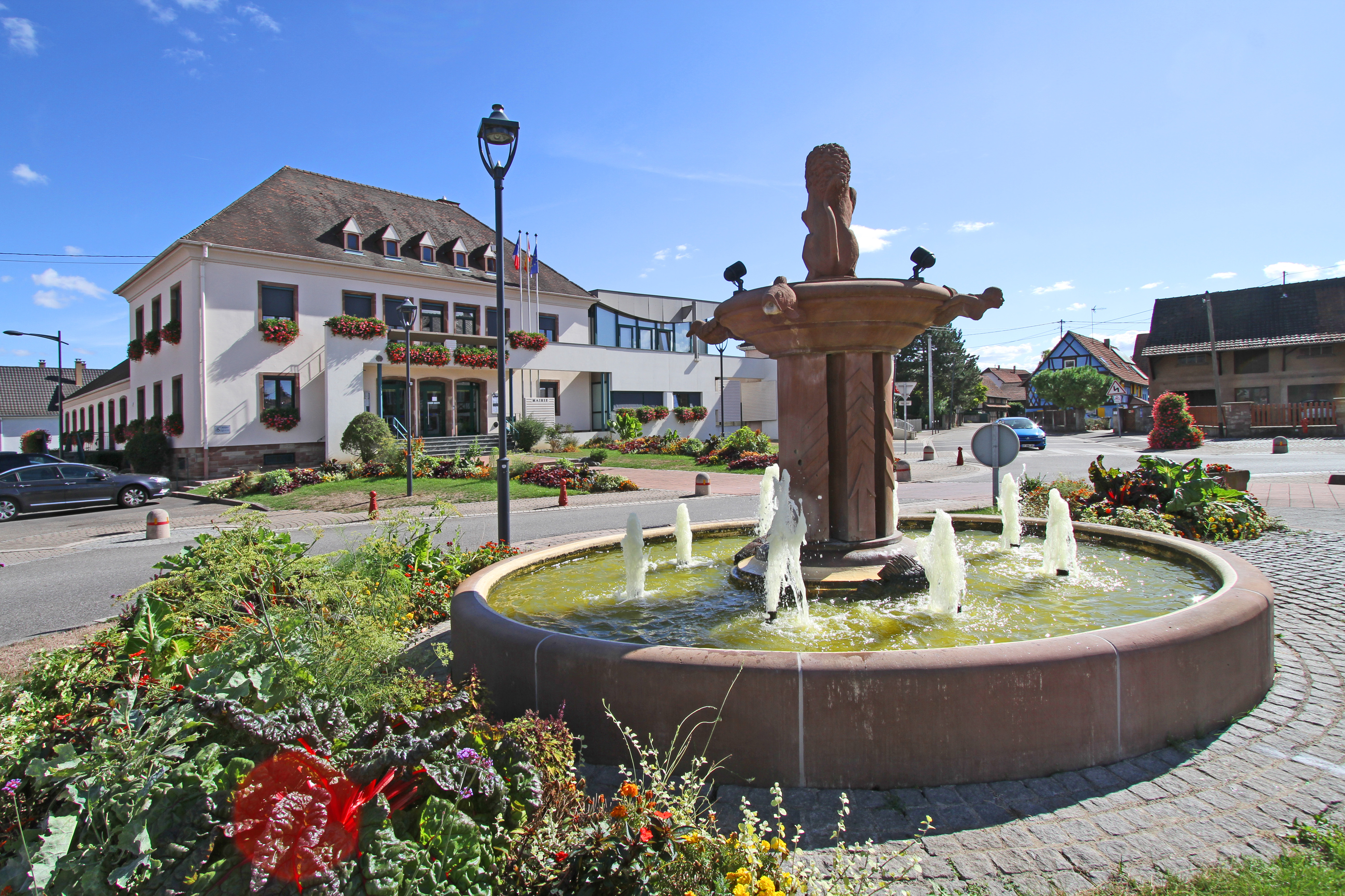 Herrlisheim